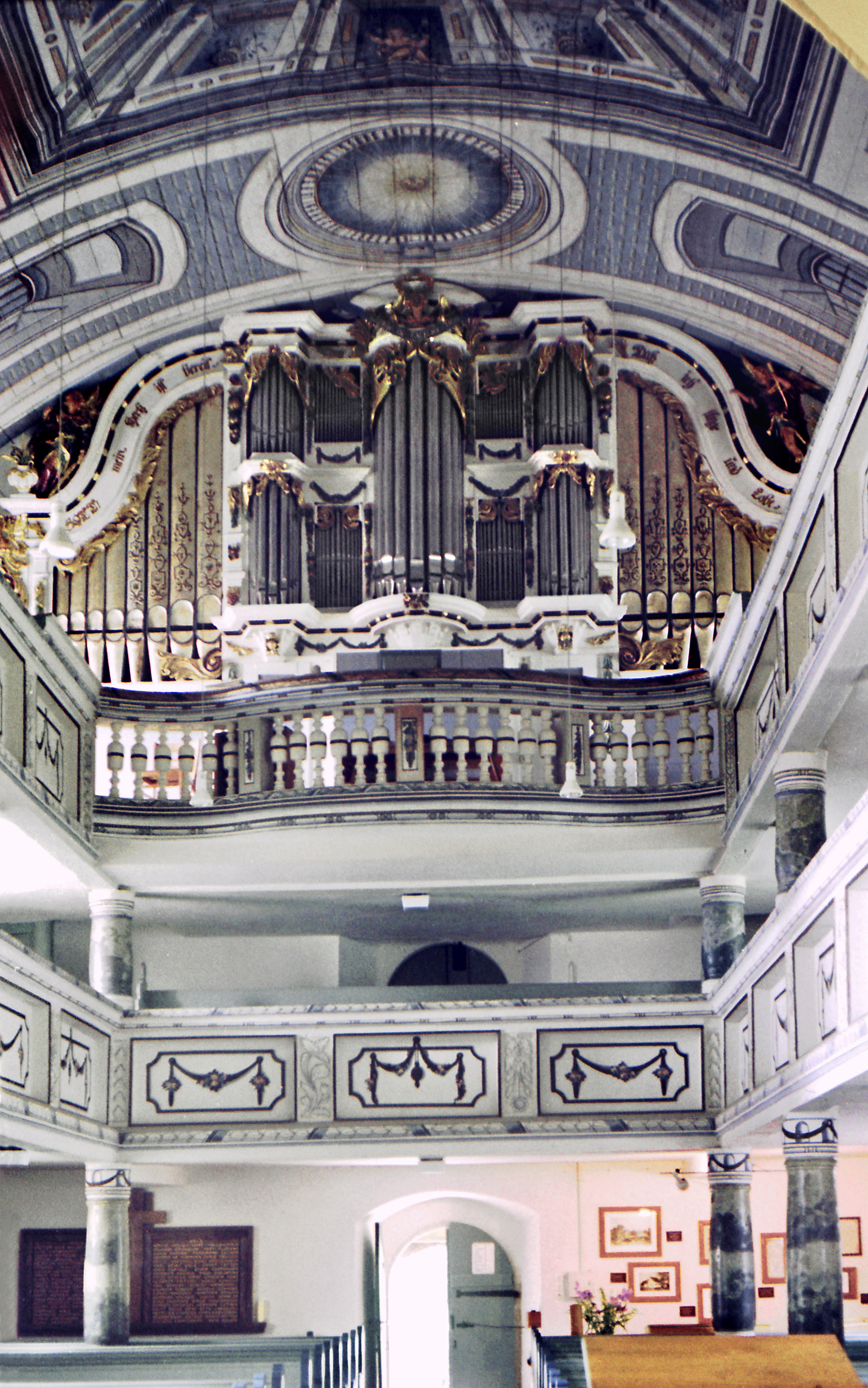 10.07.1985 DDR 6201 [36433] Möhra [Moorgrund], Lutherplatz: Im "Lutherstammort Möhra" steht die Lutherkirche (GMP: 50.862162,10.255876) mit dem spätgotischen Chor mit Turm und dem barocken Langhaus von 1699-1704. Aus der Trinitatiskirche zu Ruhla bei Eisenach kaufte man 1686 eine alte Orgel, deren Barockprospekt uns noch heute erhalten ist. Bemerkenswert sind die nach 1705 in den Außenfeldern eingefügten dicken Holzpfeifen, die mit einer Silberfolie belegt wurden und so Metallpfeifen vortäuschen sollten. 1983 baute d. Fa. Böhm aus Gotha in das alte Gehäuse eine neue Orgel mit 15 Registern ein. [F19850710A13.jpg]19850710040NR.JPG(c)Blobelt